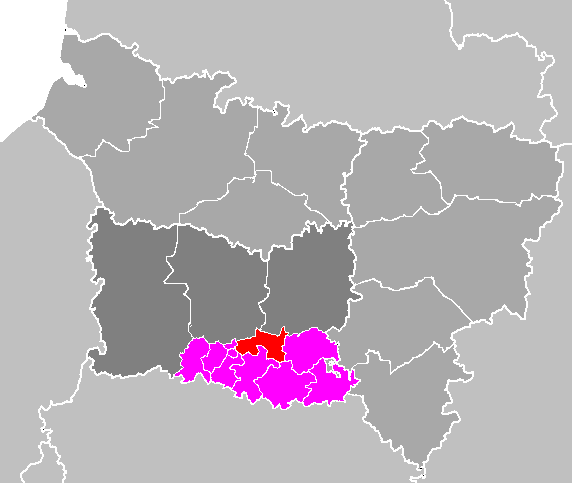 Maps of arrondissements and cantons of France: Département de l'Oise